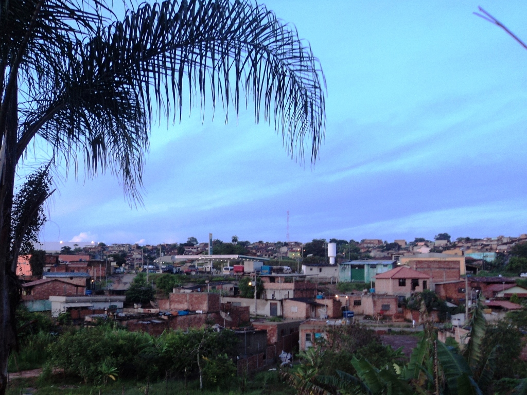 Bairro San Marino em janeiro de 2011, às seis da manhã.